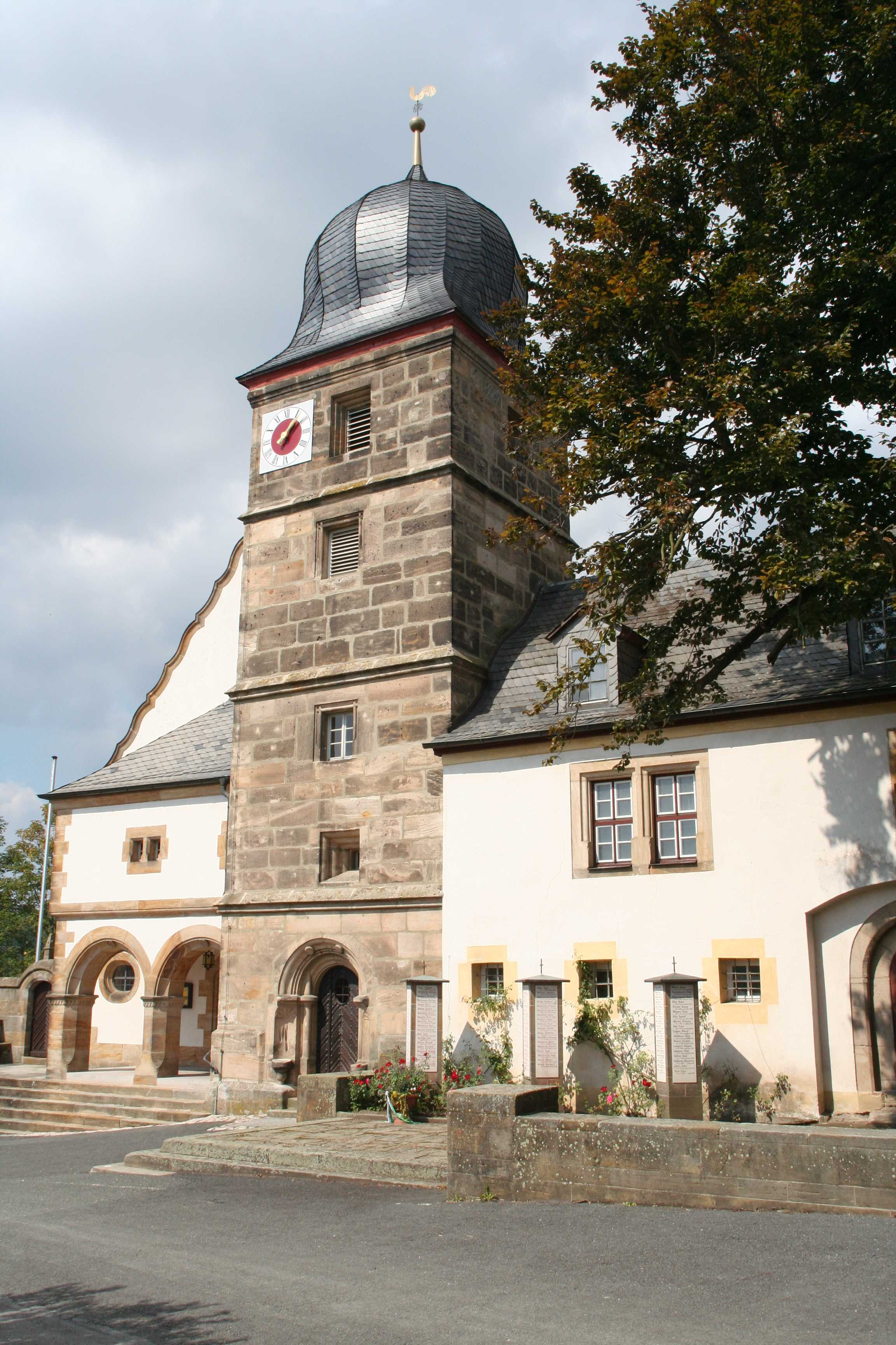 Evang.-Luth. Pfarrkirche St. Aegidius Redwitz an der Rodach im Landkreis Lichtenfels in Bayern